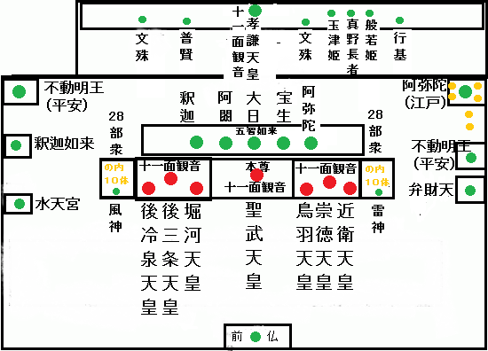 太山寺の内陣